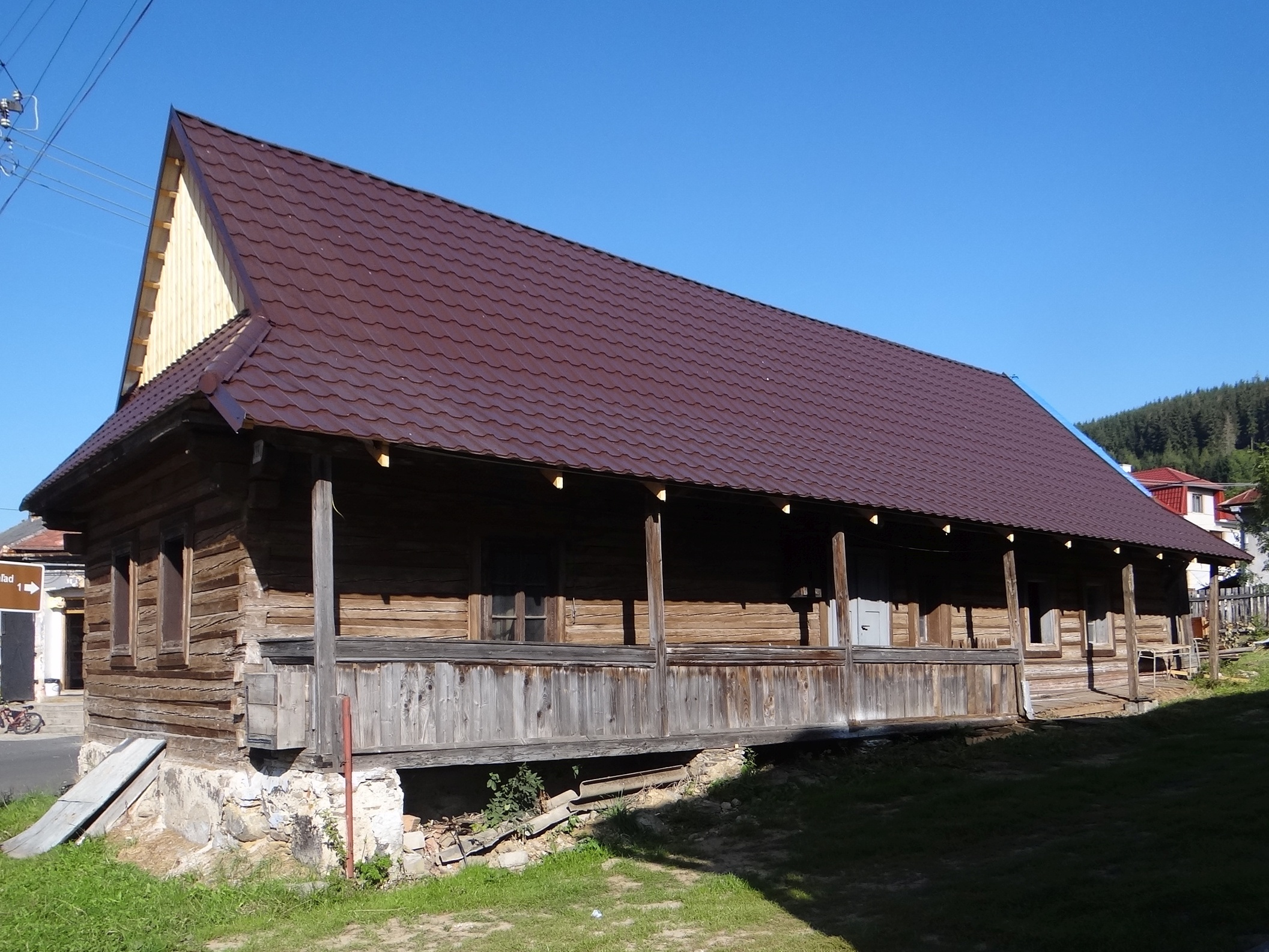 Šumiac